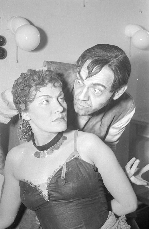 Original image description from the Deutsche Fotothek Szenenbilder mit Josef Burgwinkel in der Titelrolle, Tiana Lemnitz als Gilda, Carola Goerlich als Maddalena und Peter Anders als Graf von Mantua